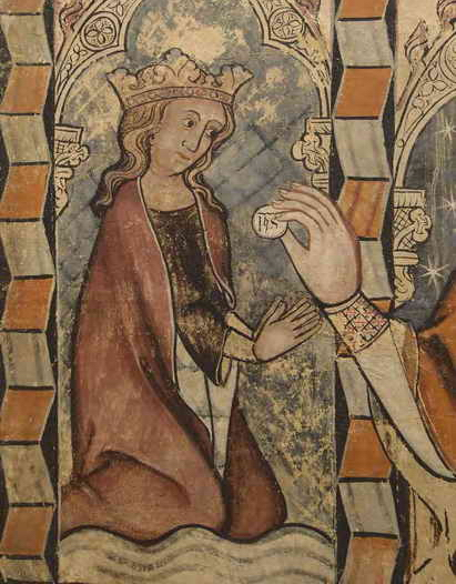 Sibil·la de Fortià a San Miguel de Daroca